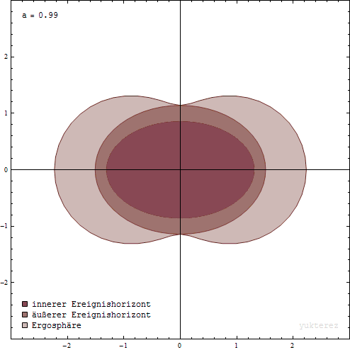 Diagramm der Ergosphäre und des inneren und äußeren Ereignishorizonts eines rotierendes schwarzen Lochs. "a" ist der Spin-Parameter des SL; die Achsen sind in Einheiten von GM/c². Animation: klick